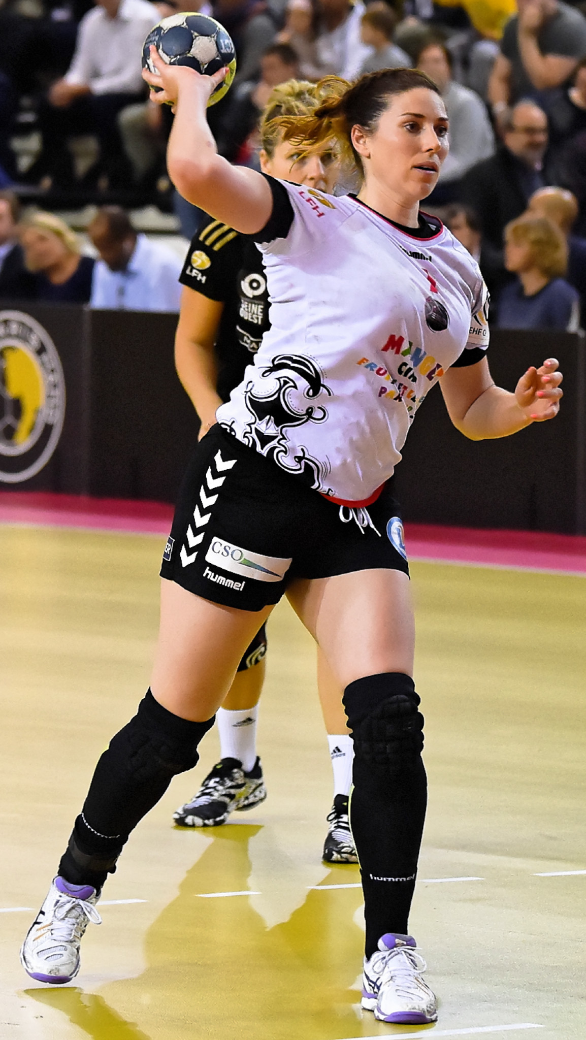 Rencontre de demie-finale retour de championnat entre Issy Paris et Brest. A Issy les Moulineaux, le 19 mai 2017.